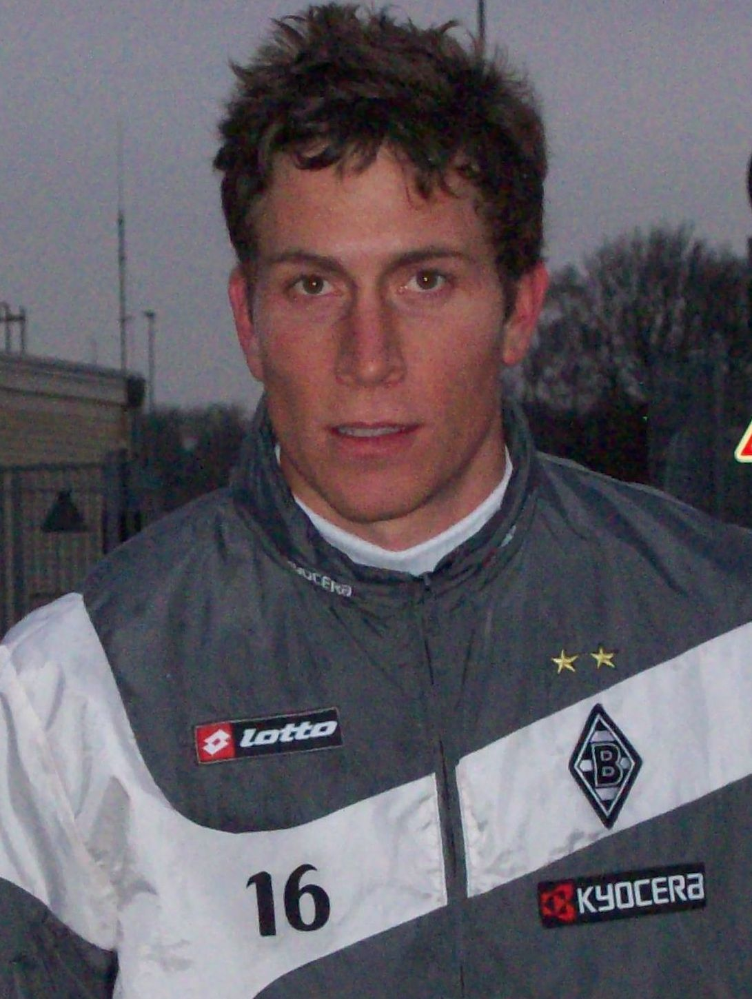 Rob Friend Bor.M'gladbach